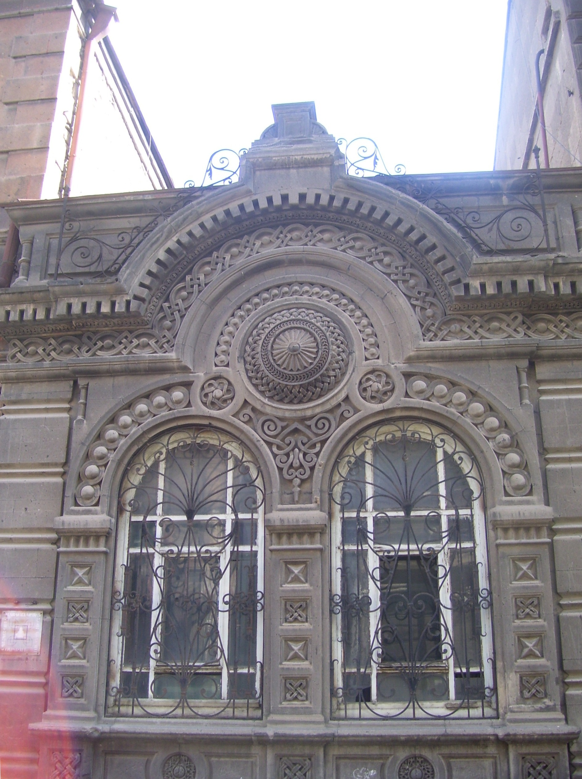 Բնակելի տուն՝ Միխայիլ ֆոն դեր Նոննեի 1895 թ. Հանրա-պետության փող. 30, Ճարտ.` Մ. ֆոն դեր Նոննե, 1922-1937 թթ.` Հայկական դիվիզիայի շտաբ 6/203.7